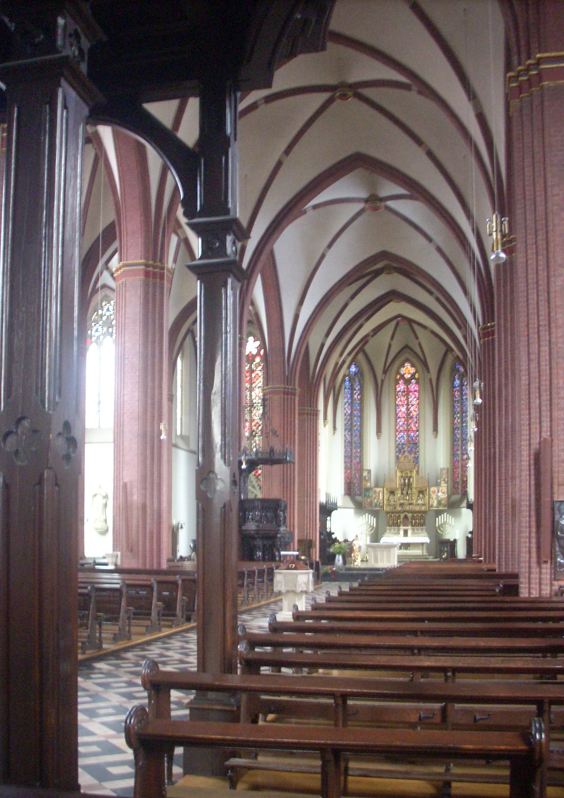 Haltern, kath. Pfarrkirche St. Sixtus, Inneres